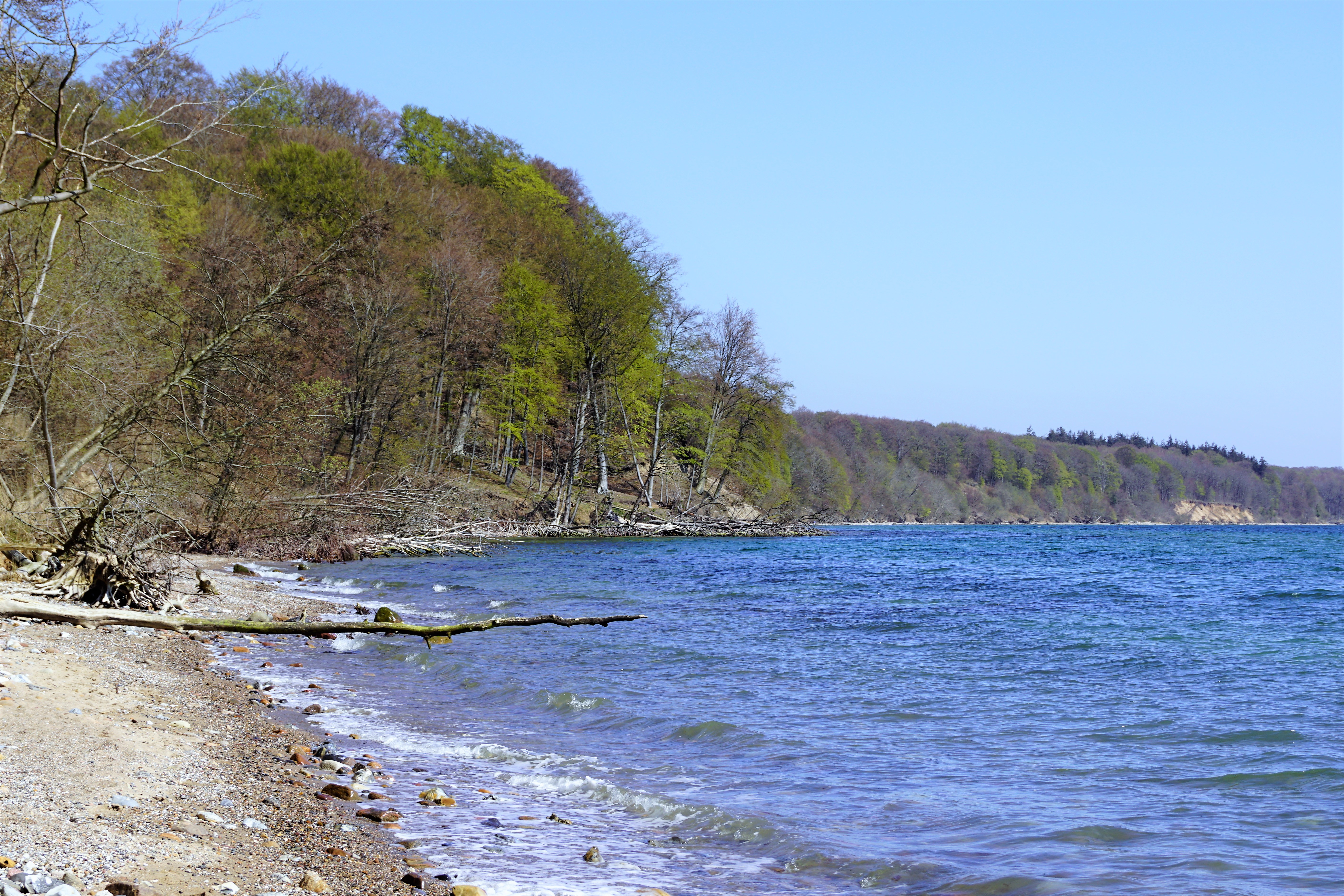 Stakrode Skov ved nordsiden af Vejle Fjord